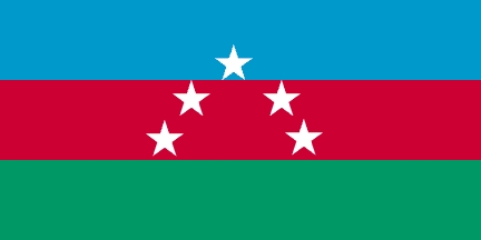 Bandera de Pedro Moncayo